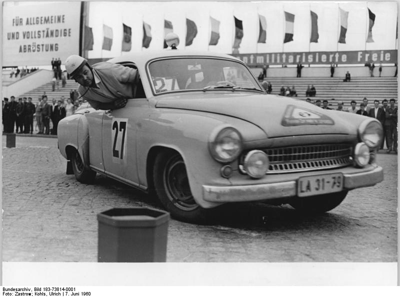 Zentralbild Zastrow-Kohls 7.6.1960 I. Internationale Automobil-Rallye Die Teilnehmer der I. Internationalen Automobil-Rallye "Für Frieden und Freundschaft" über 5000 Kilometer Moskau-Warschau-Berlin-Prag trafen am 7.6.1960 in Berlin ein. Auf dem Marx-Engels-Platz starteten sie zu einem Automobilslalom. UBz: Jäger-Möller (DDR) auf Wartburg während des Slaloms."